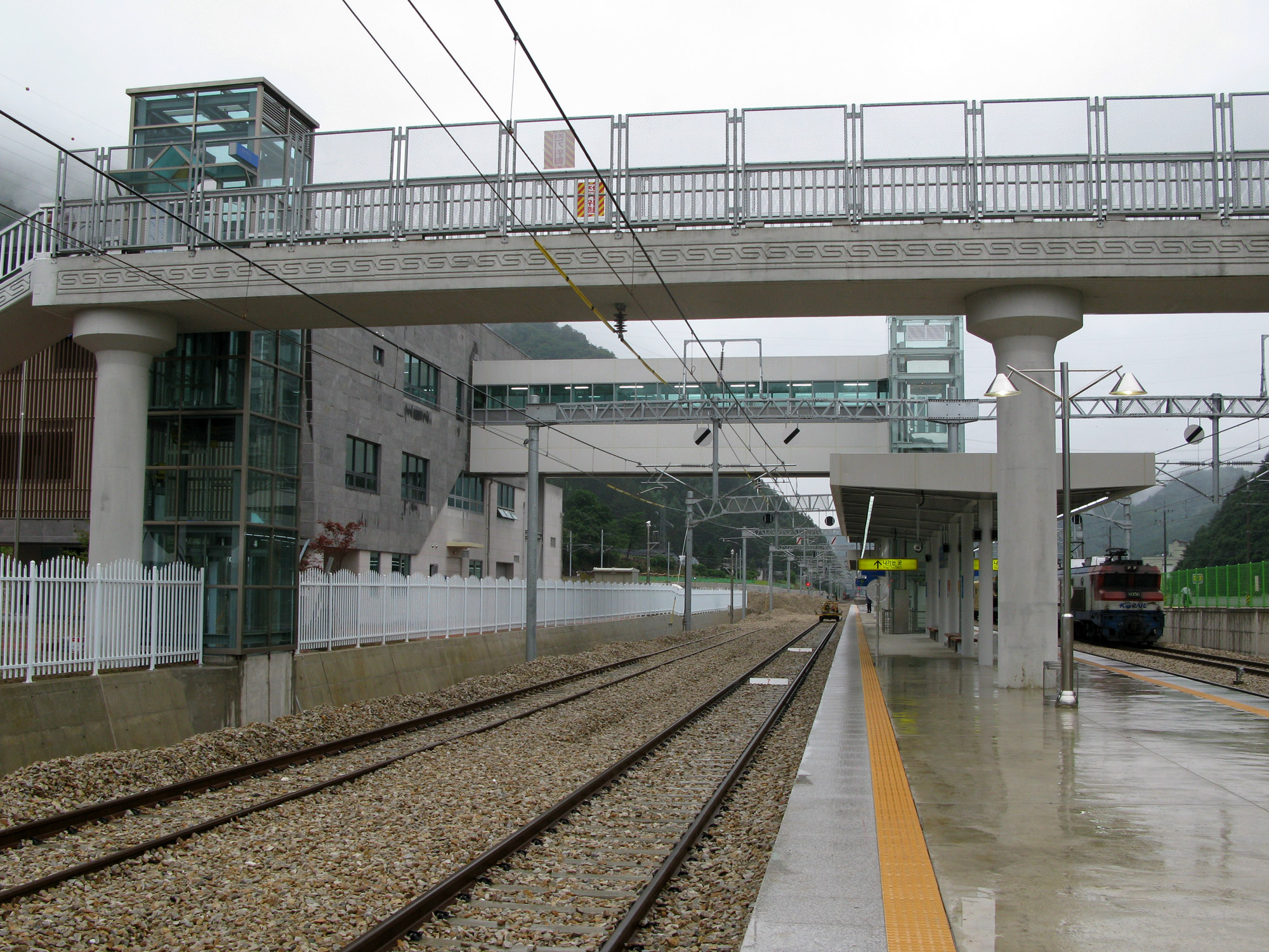 영동선, 태백선 동백산역 승강장